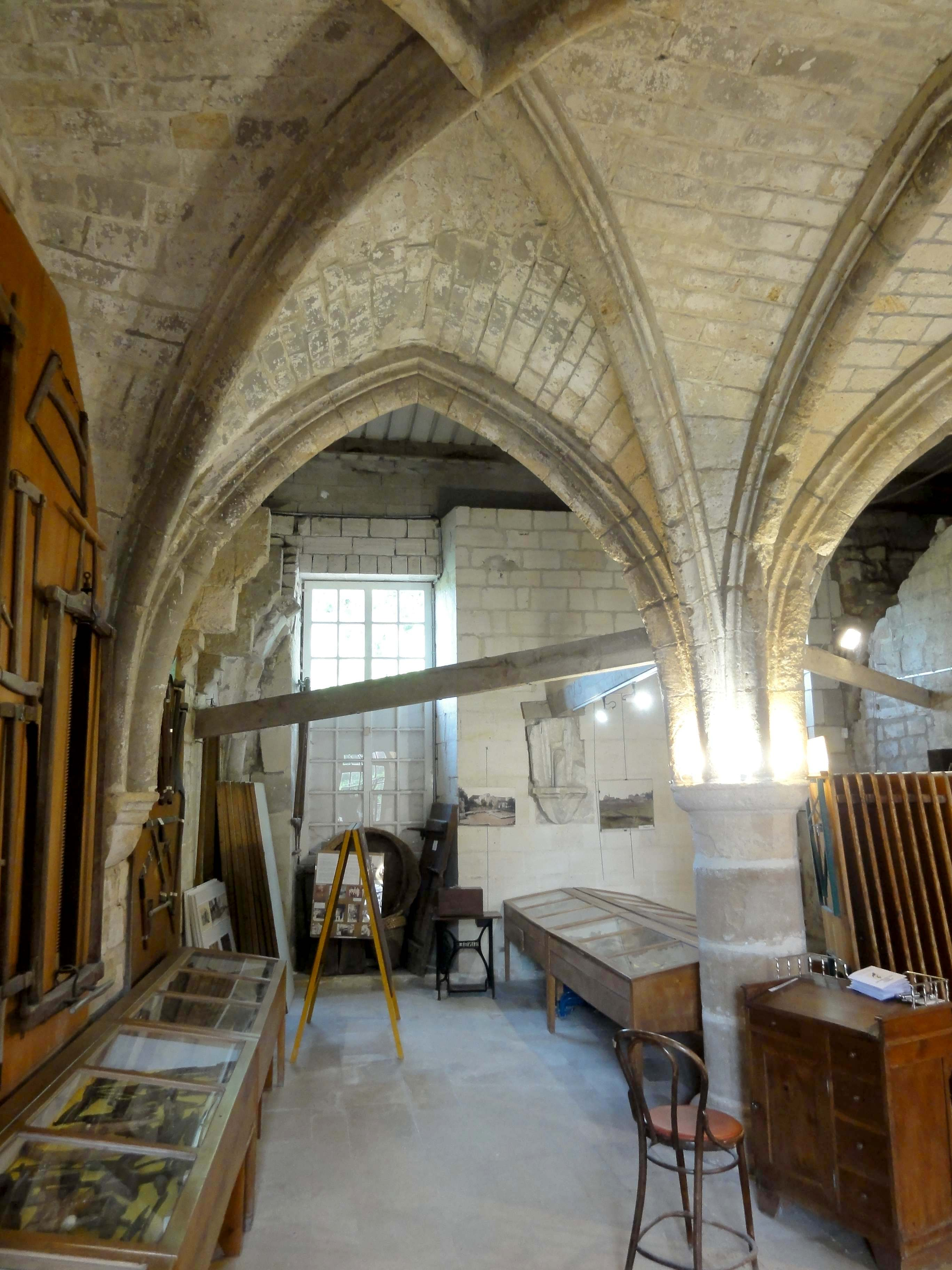 Intérieur de l'ancien prieuré - voir titre.